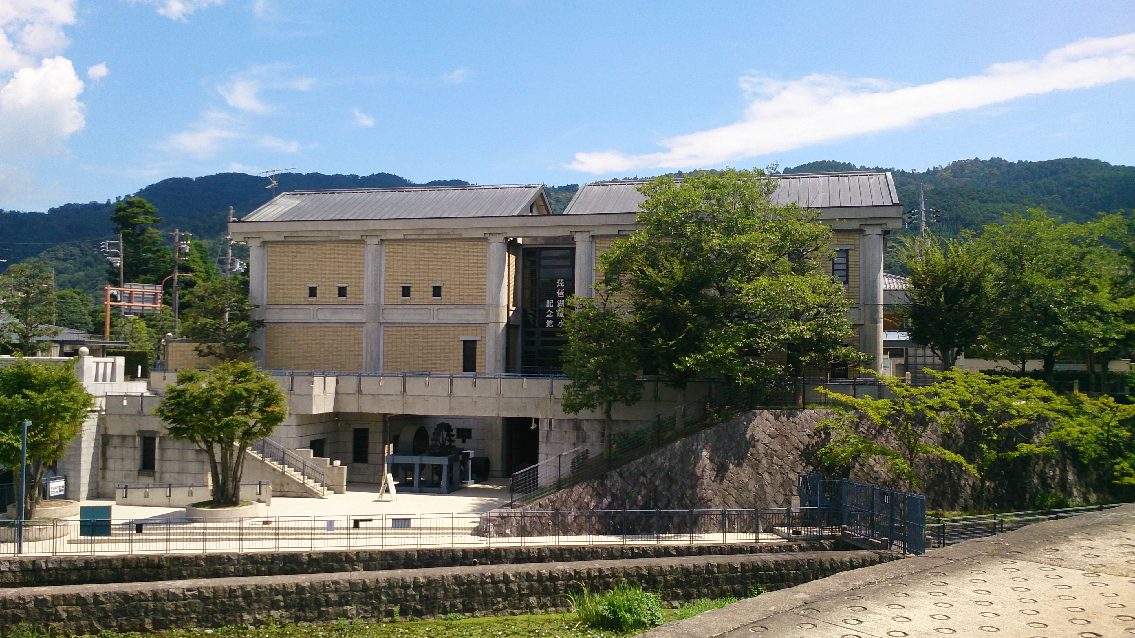 琵琶湖疏水記念館